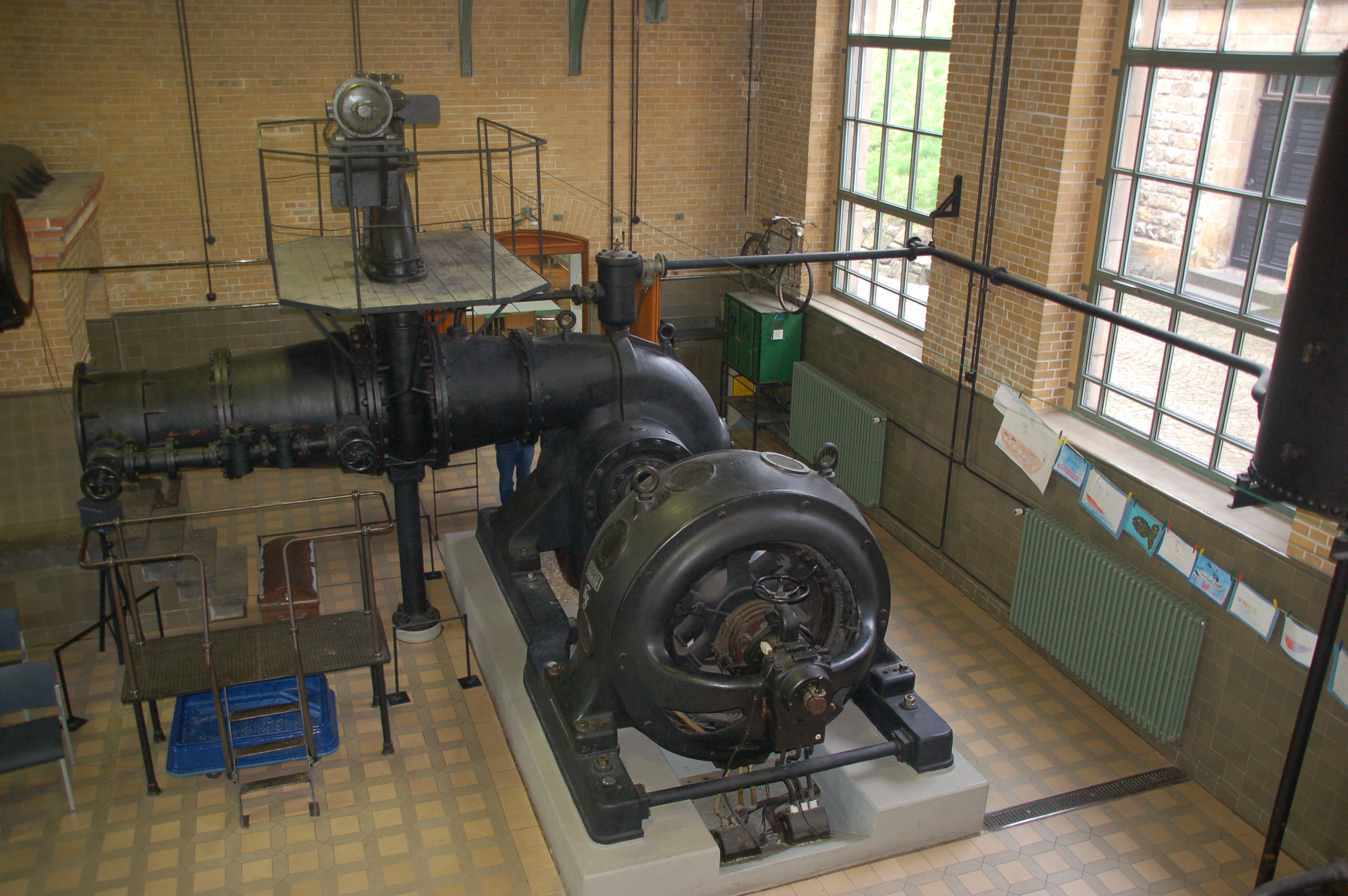 Pump in Ship Lift Henrichenburg